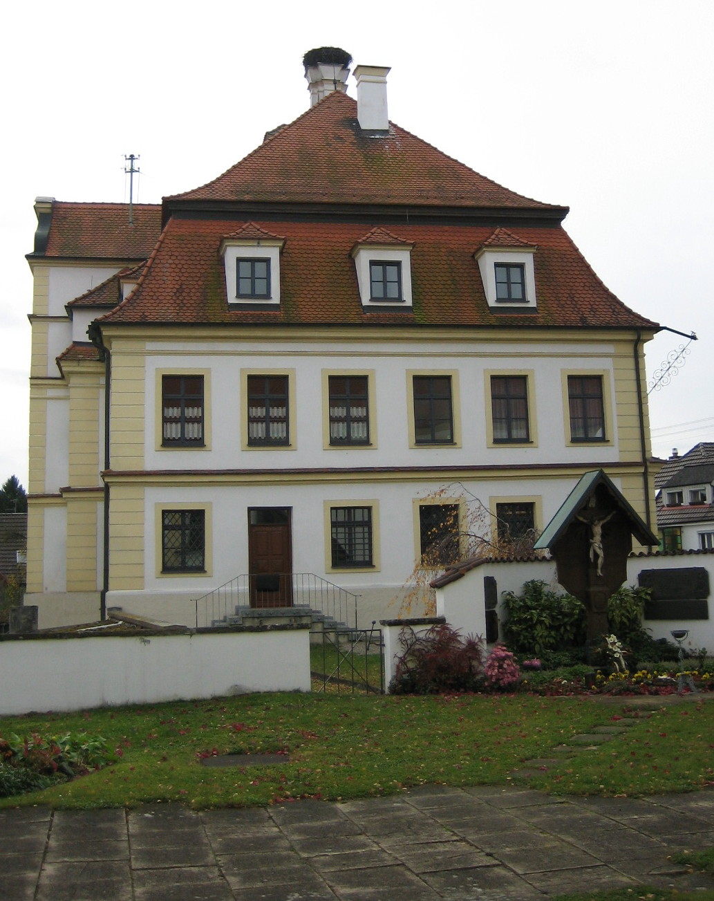 Offinger Pfarrhof neben der Kirche St. Georg